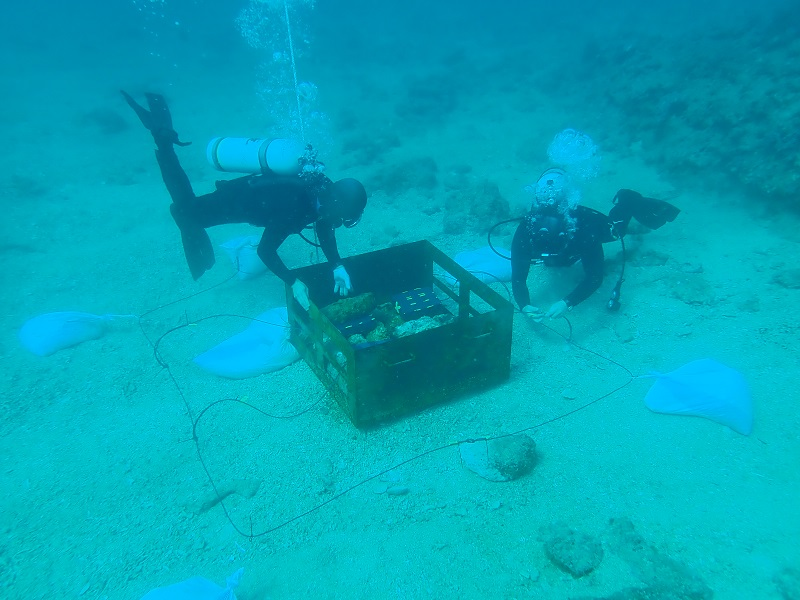 海上自衛隊沖縄水中処分隊による爆発物処理